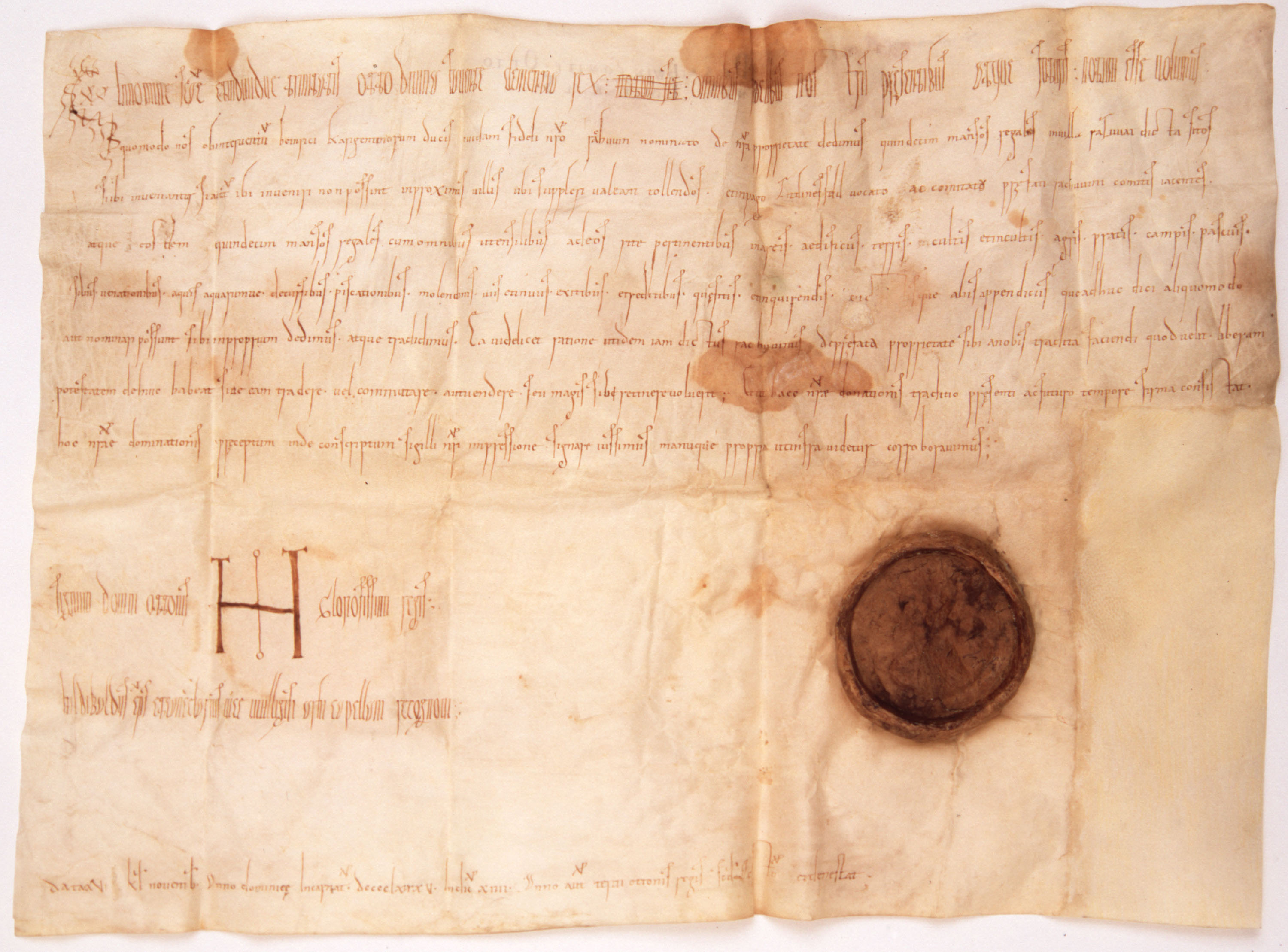 Daritvena listina iz l. 985 v kateri Kralj Otto III. v Razvanju podarja grofu Rachuuin-u 15 kraljevih kmetij v Razvanju ( RAZUUAI ).